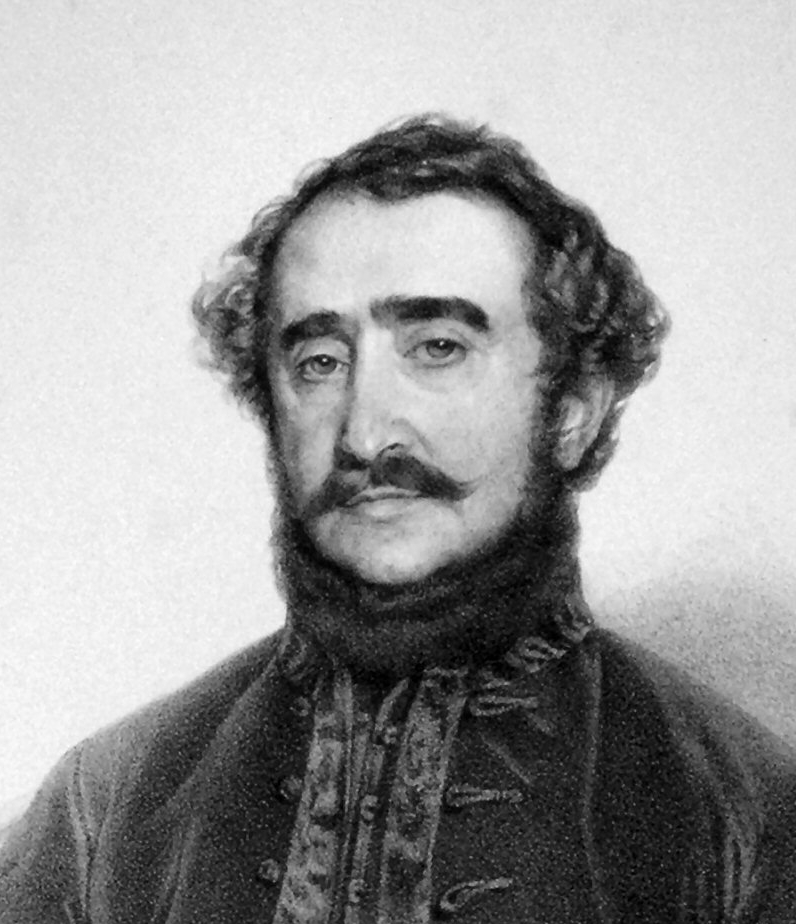 István Széchenyi, Lithographie von Franz Eybl, 1842